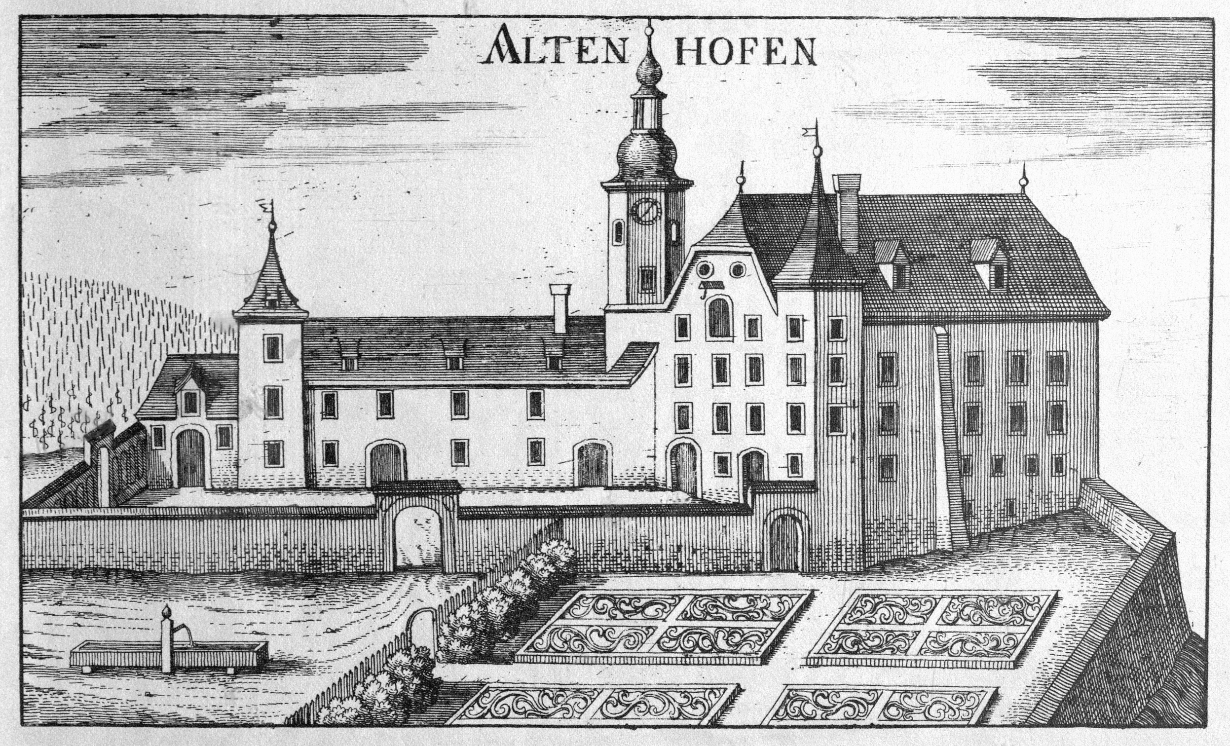 G. M. Vischers Käyserlichen Geographi, Topographia Ducatus Stiriae, Das ist: Eigentliche Delineation / und Abbildung aller Städte / Schlösser / Marcktfleck / Lustgärten / Probsteyen / Stiffter / Clöster und Kirchen / so es sich im Herzogthumb Steyrmarck befinden; Und anjetzo Umb einen billichen Preyß zu finden seynd Bey Johann Bitsch Universitäts Buchhandlern / Auff dem Juden=Platz bey der guldenen Saulen. Graz 1681